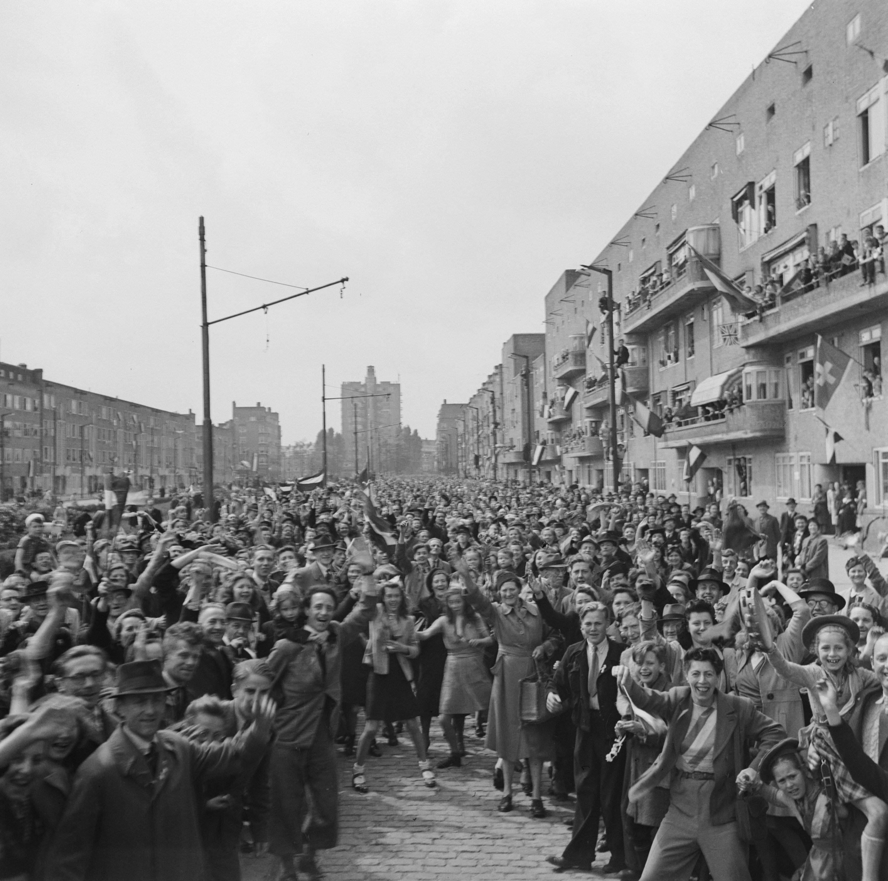 Collectie / Archief : Fotocollectie Anefo Reportage / Serie : Bevrijdingsvreugd: Amsterdam Beschrijving : Enorme menigte op de Amstellaan te Amsterdam Op de achtergrond de zgn. "wolkenkrabber". Annotatie : De Amstellaan werd na de bevrijding omgedoopt in Stalinlaan en vervolgens na 1956 in Vrijheidslaan. Datum : 8 mei 1945 Locatie : Amsterdam, Noord-Holland Trefwoorden : bevrijding, feesten, tweede wereldoorlog Fotograaf : Fotograaf Onbekend / Anefo Auteursrechthebbende : Nationaal Archief Materiaalsoort : Negatief (zwart/wit) Nummer archiefinventaris : bekijk toegang 2.24.01.03 Bestanddeelnummer : 900-2830